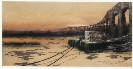 Latium